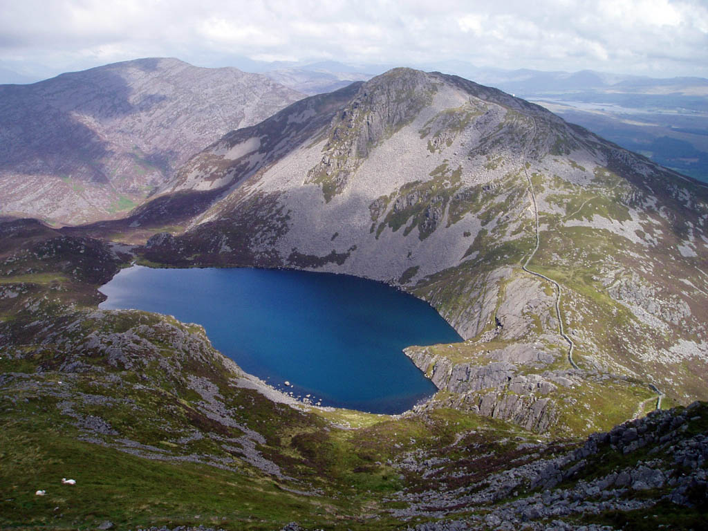 Llyn Hywel and Rhinog Fach from Y Llethr, Snowdonia National Park, Wales